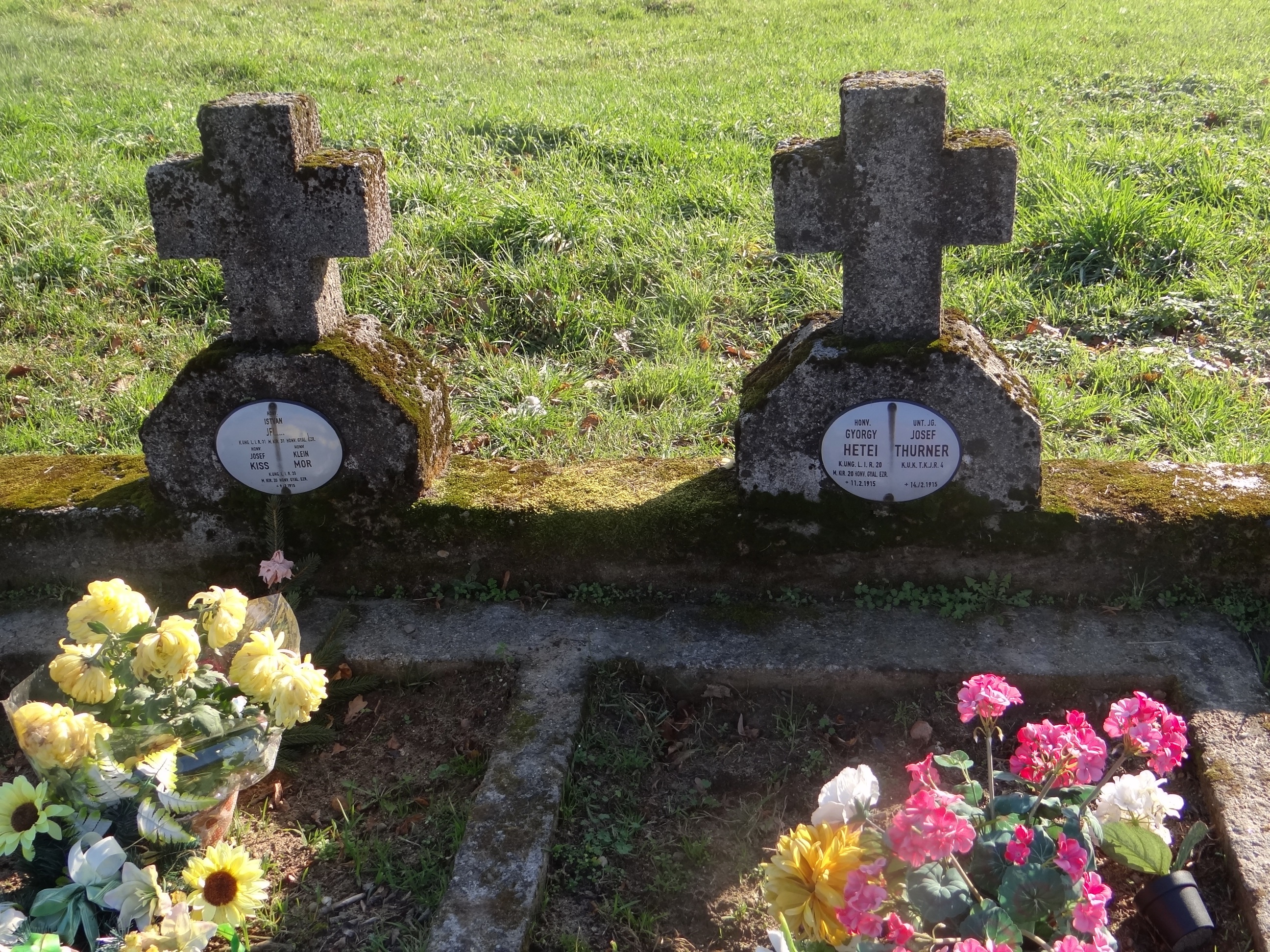 Cmentarz wojenny nr 266 - Borzęcin